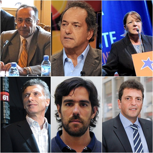 Montagem dos candidatos à presidência da Argentina em 2015.